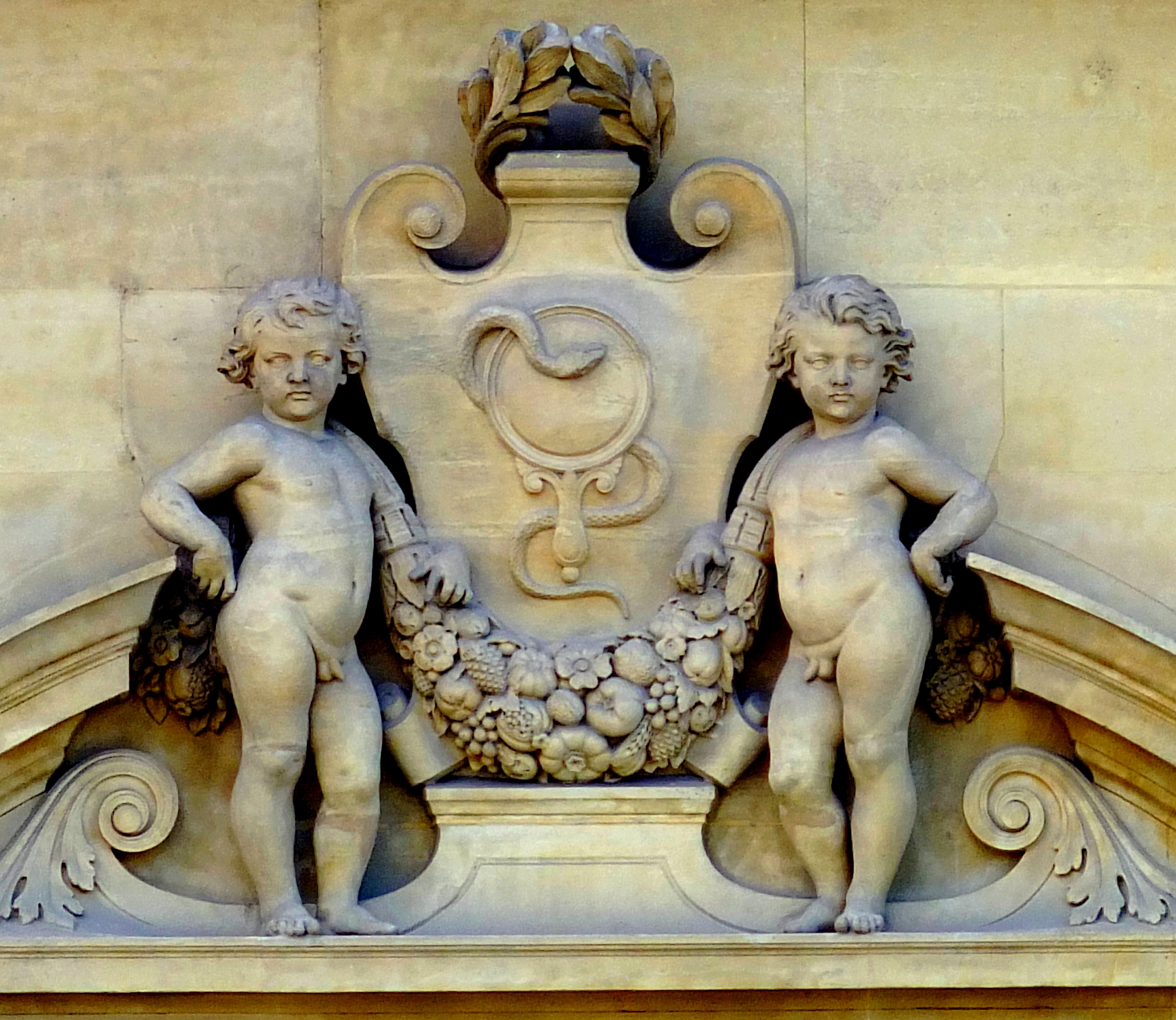 Élement décoratif, fronton de fenêtre, sculpté sur la façade de la cour de cassation à Paris, quai de l'Horloge (Paris 1er arrond. Téléobjectif (équivalent 1200 mm) depuis le quai de la Mégisserie. Sculpteur Henri Chapu)